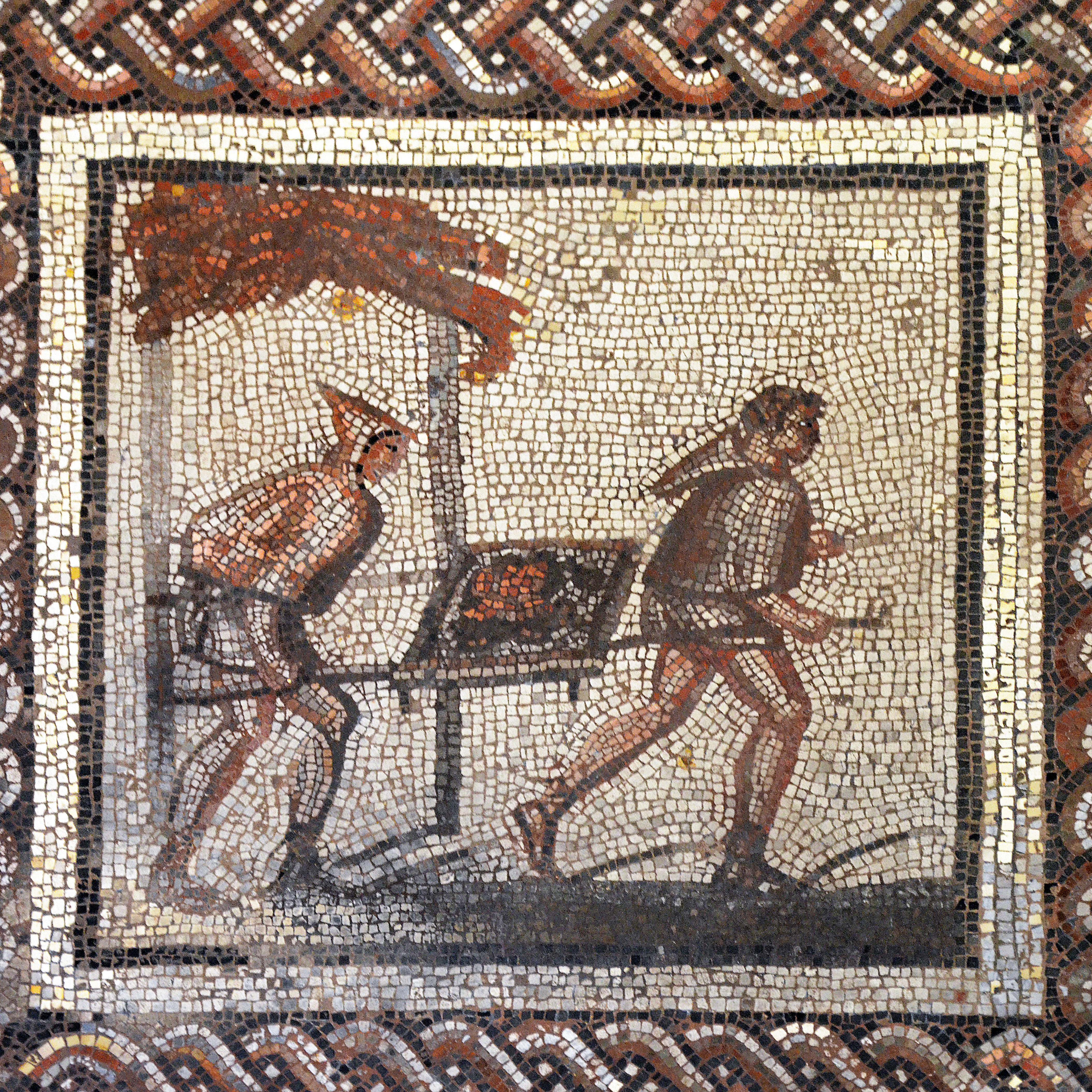 Mosaic depicting a rustic calendar, from Saint-Romain-en-Gal, first quarter of 3rd century AD, Musée d'Archéologie Nationale, Saint-Germain-en-Laye